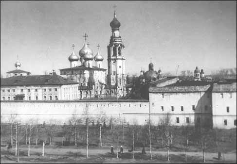 Вид на Архиерейский двор в Вологде со южной стороны.